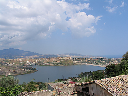 DigasulLordo